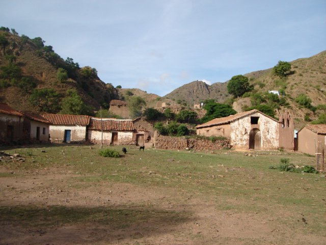 Foto Tomada el 2007, duarante un viaje a la zona de Norte Potosí